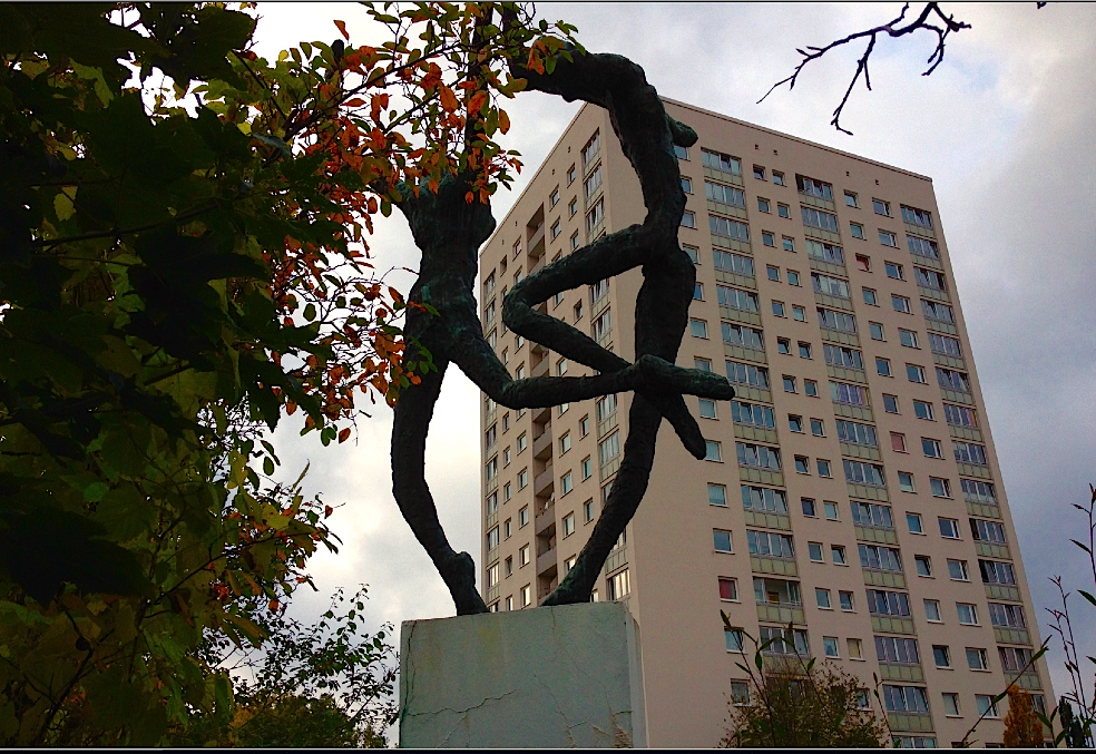 Skulptur im grünen Zentrum Hamburg Lohbrügge Korachstraße 0-9: Bronzeskulptur Tanzendes Paar - Spielplatz Hamburg Lohbrügge Nord. Bildhauer Johannes Ufer + Lore Ufer, 1968. [1]